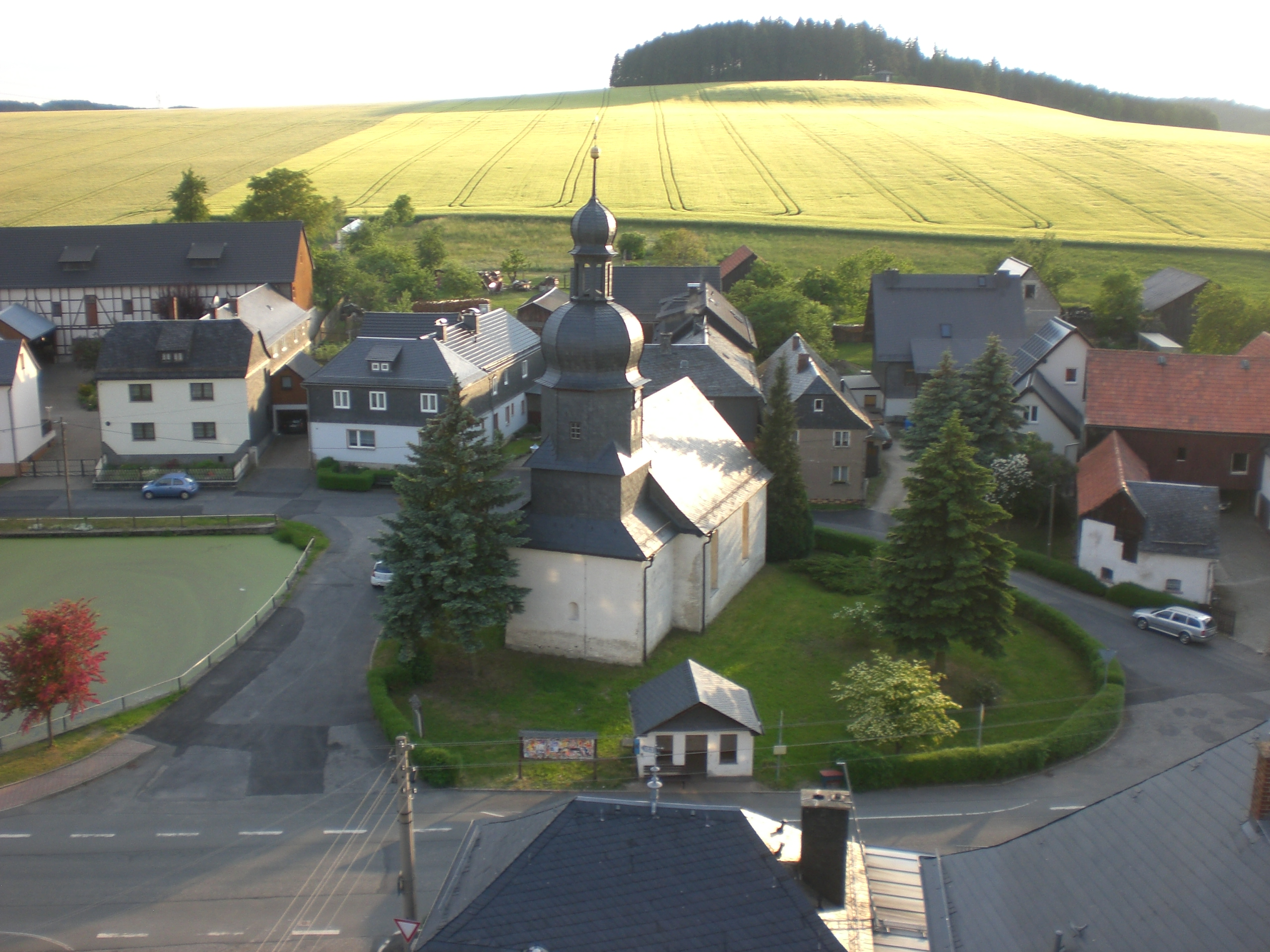 Die Lothraer Kirche aus Sicht des alten Brauereiturms.